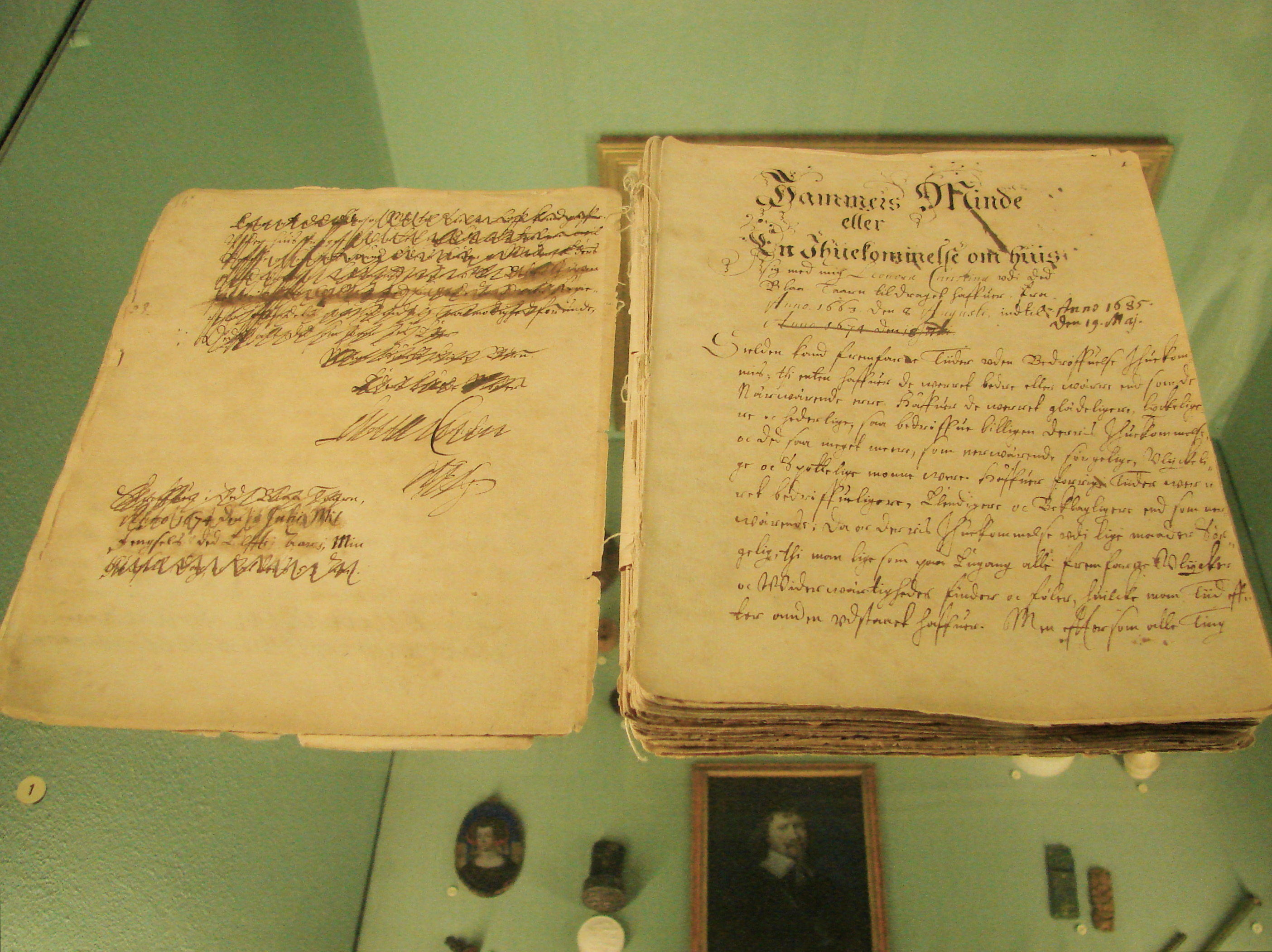 Originalmanuskriptet til Leonora Christinas Jammers-Minde, nedfældet i Blåtårn 1663-74, Frederiksborg Slot, Hillerød, Danmark